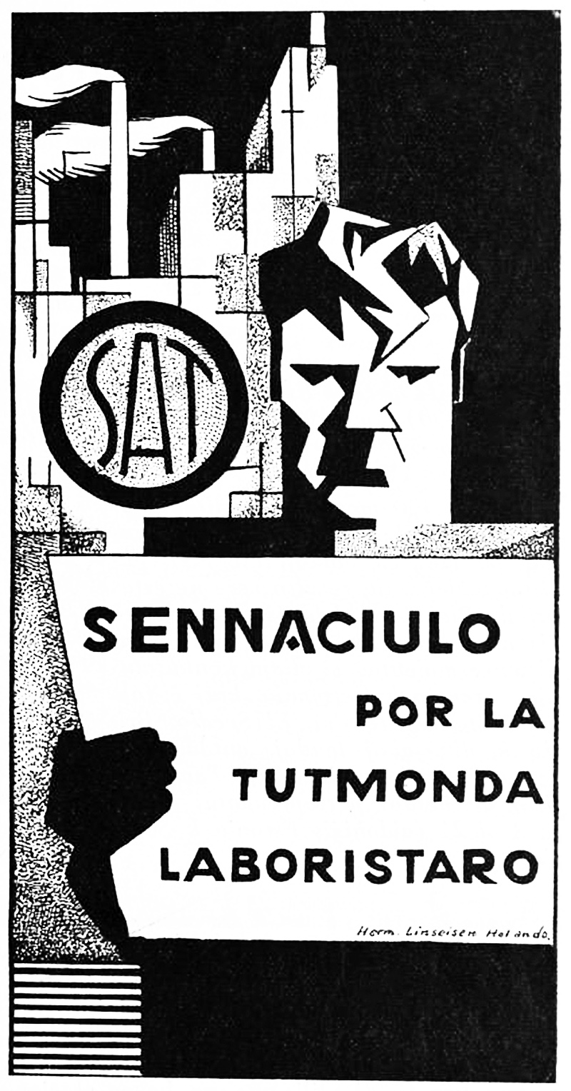 Grafikaĵo de Linseisen en Sennaciulo